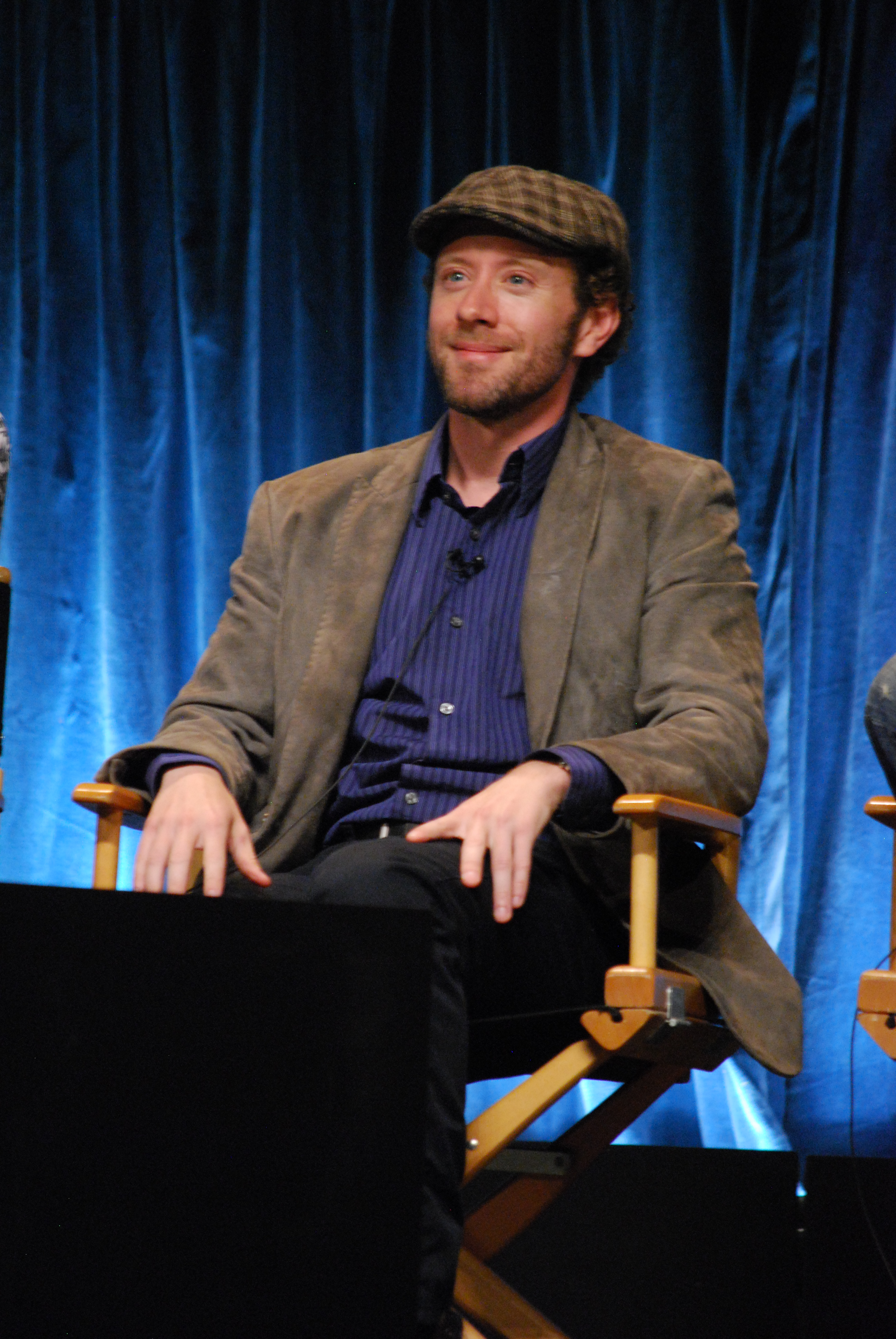 T.J. Thyne